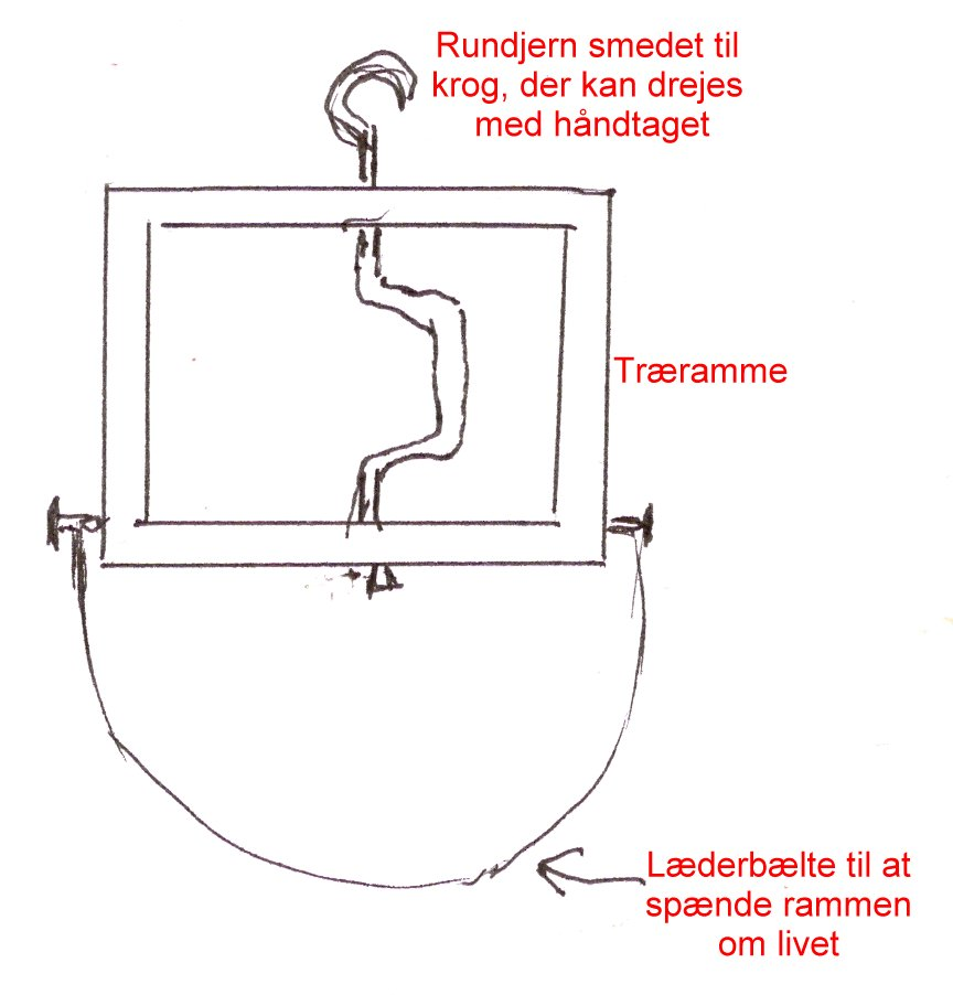 Mobil station til rebslagning sammen med rebslagerstand-1 som beskrevet under reberbane.